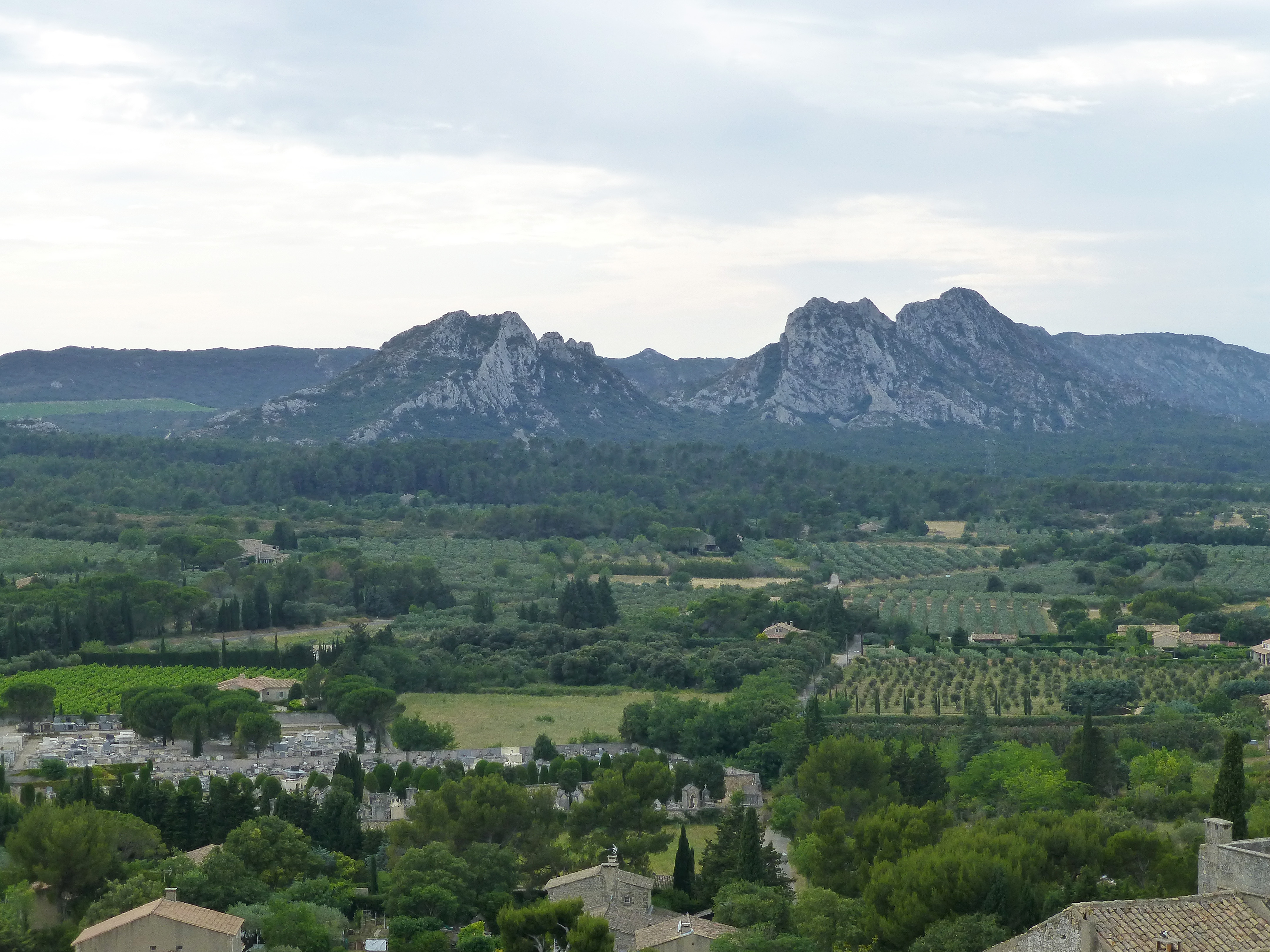 Panorama à Eygalières (Bouches-du-Rhône)